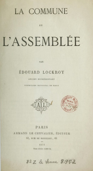 Édouard Lockroy, La Commune et l'Assemblée, couverture, 1871